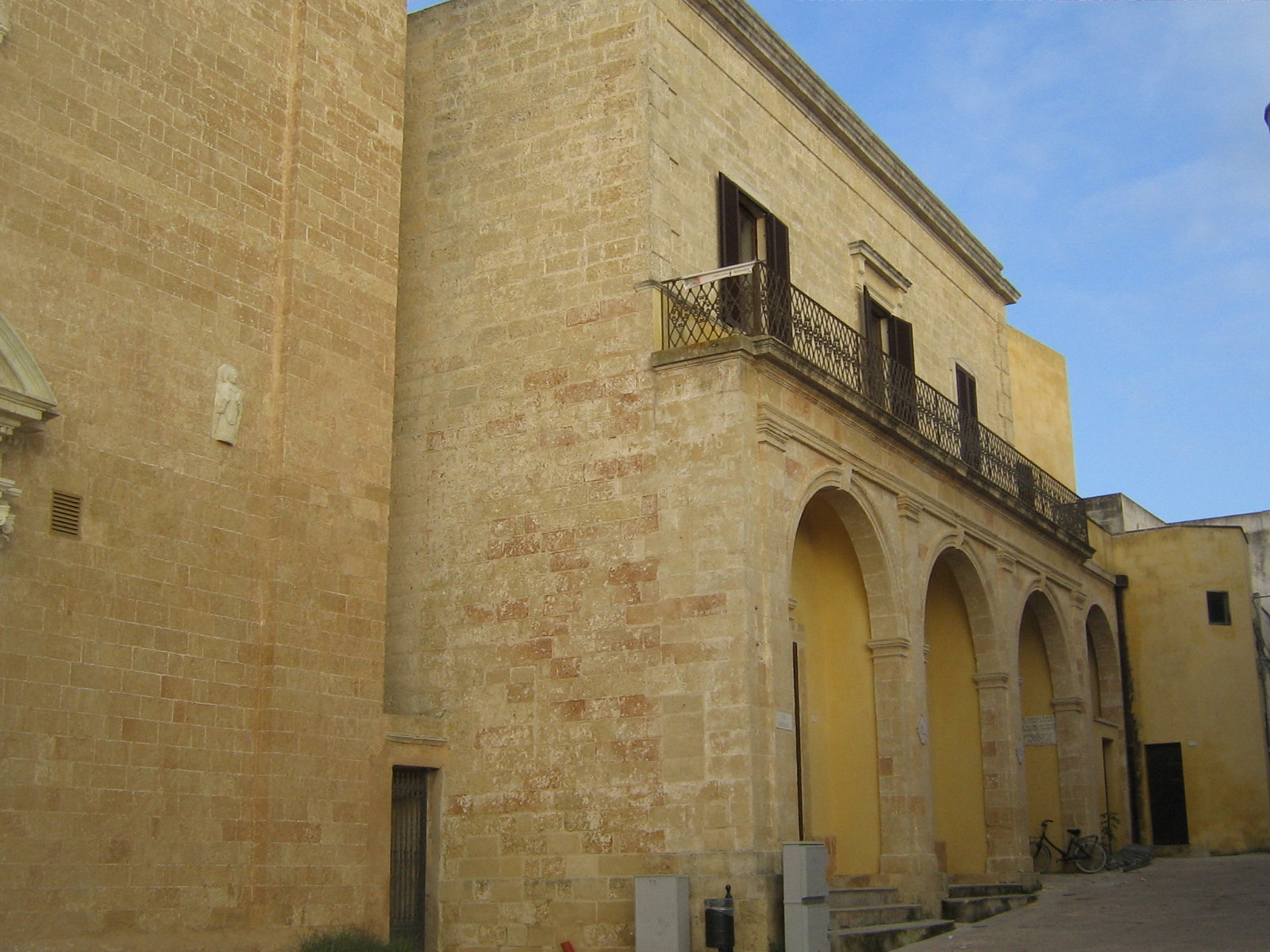 Palazzo Ciardo - Gagliano del Capo, Lecce, Italy